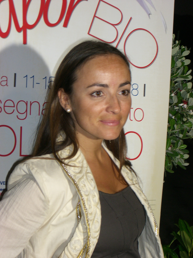 La conduttrice televisiva italiana Camilla Raznovich